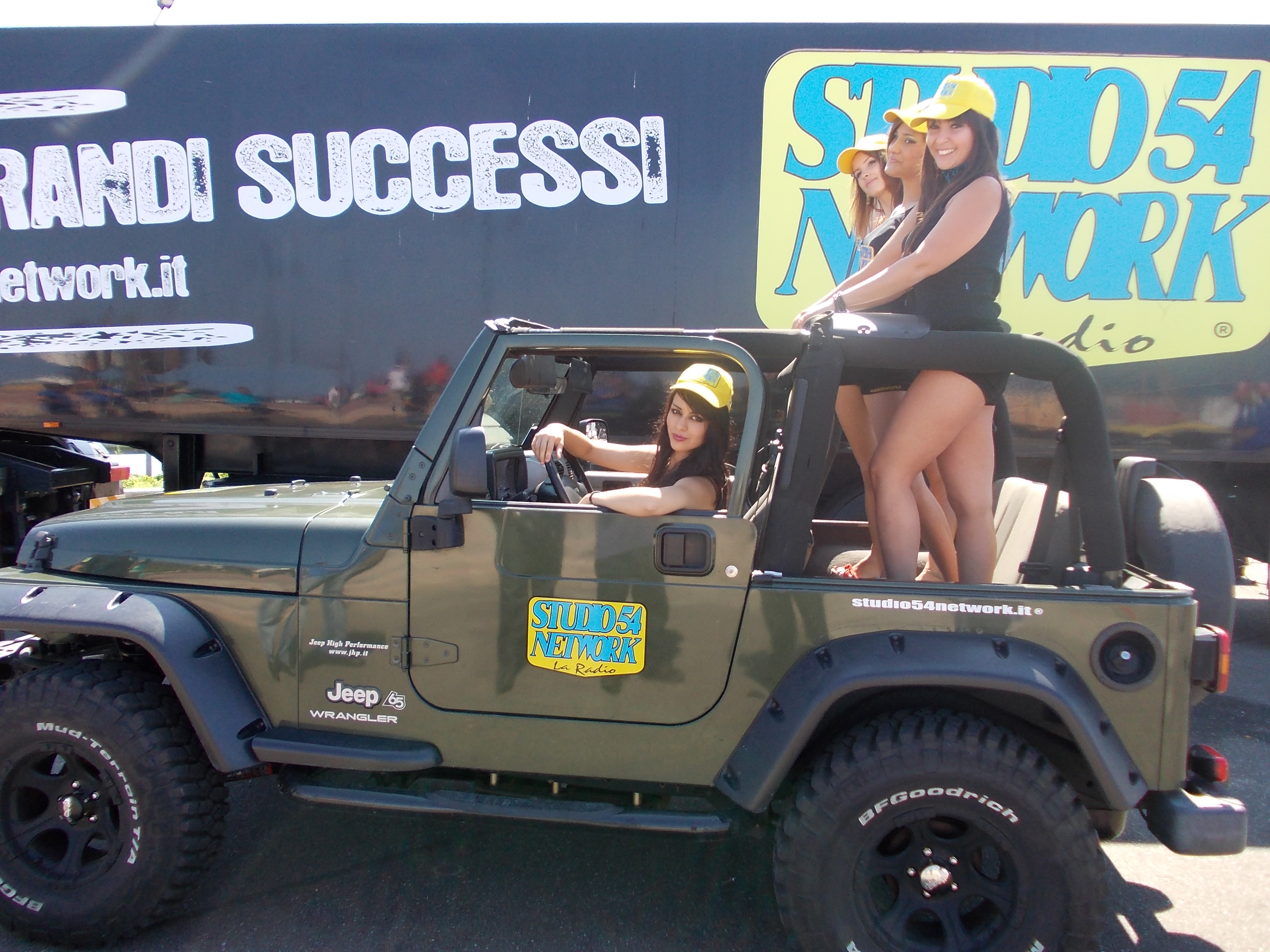 Le Studio 54 Angels di Radio Studio 54 Network su una jeep